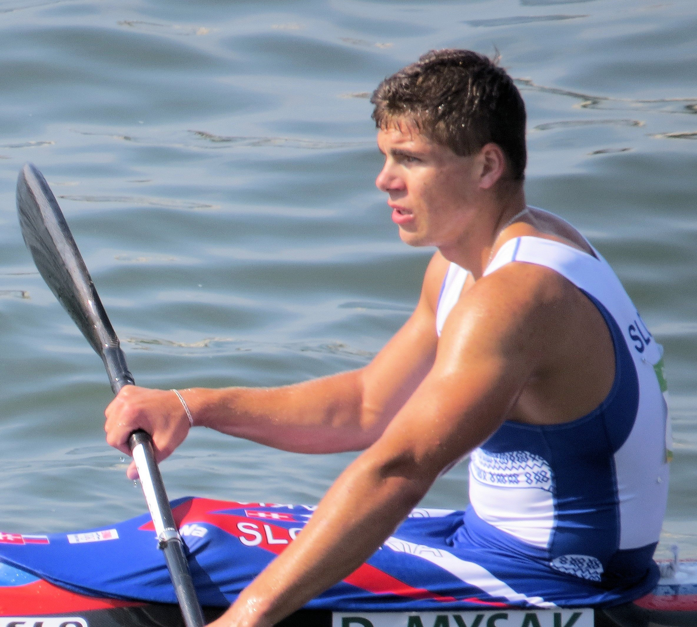 Sx50